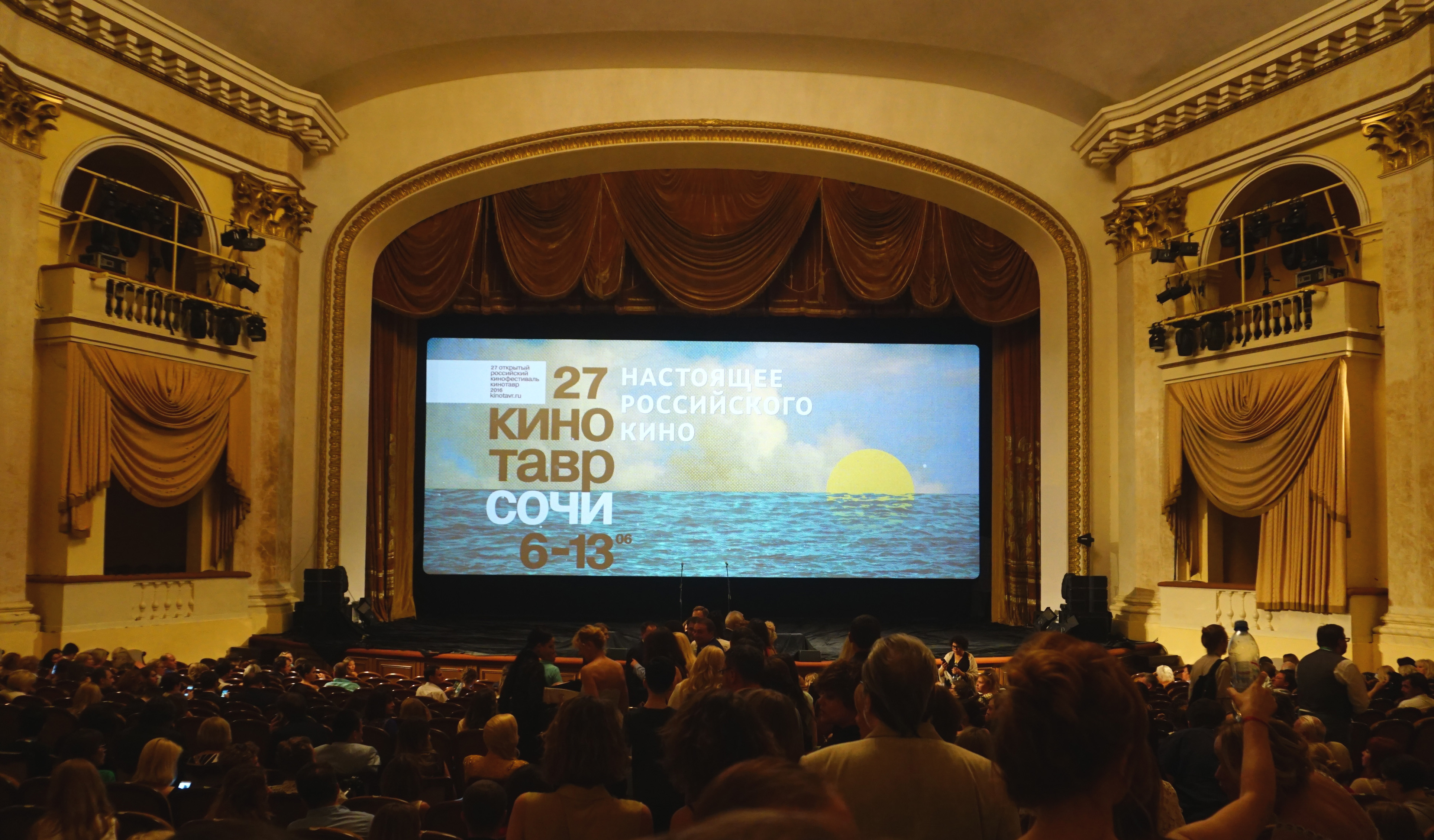 "Кинотавр - 2016". Церемония закрытия и награждения в Зимнем театре Сочи.